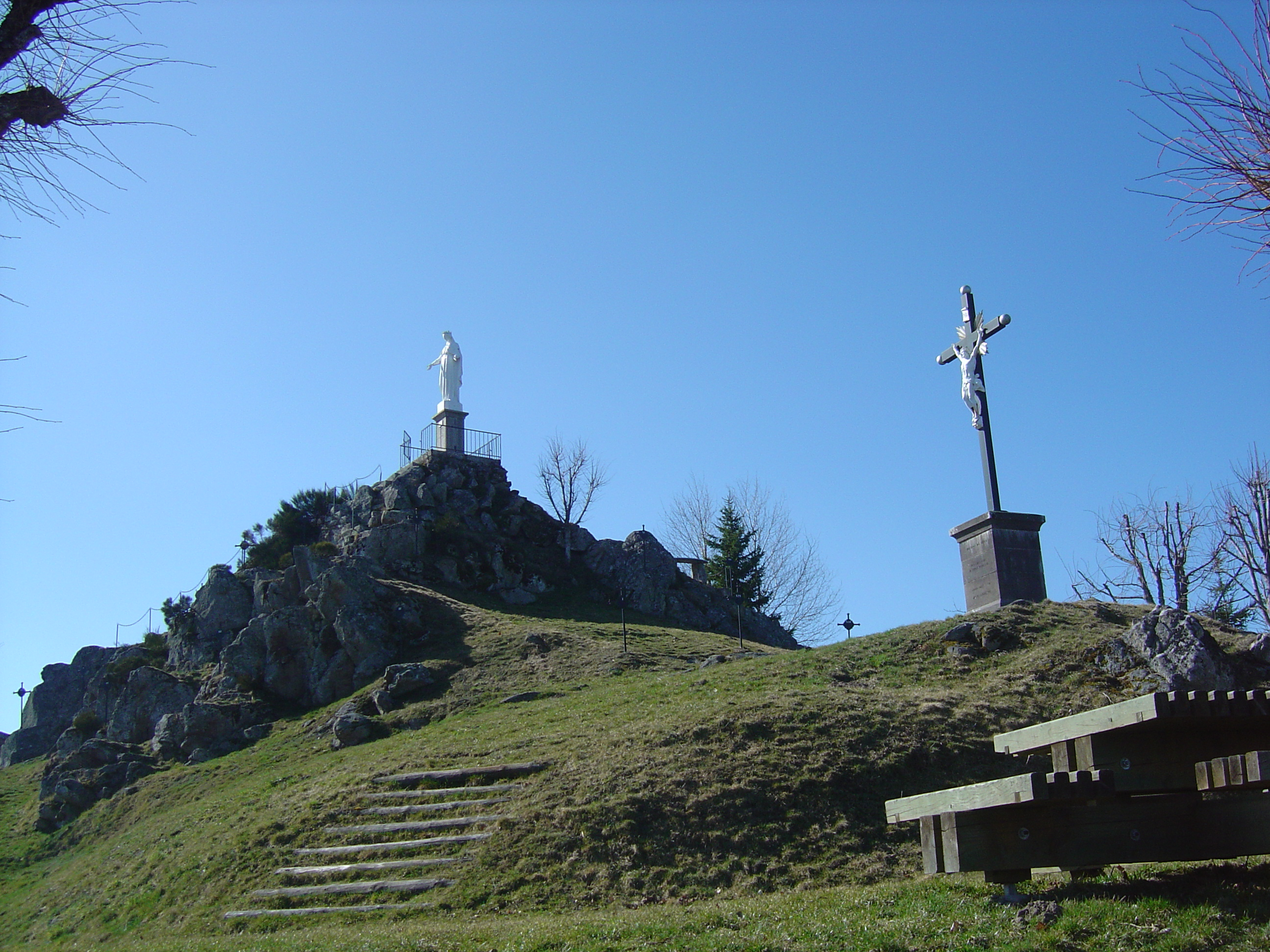 Le rocher de la Vierge sur les hauteurs du village de le Monestier